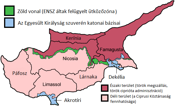 A Ciprus Köztársaság hat közigazgatási kerülete. A térképen szerepel a Ciprusi Köztársaság fennhatósága alatt álló terület, az északi, Törökország által 1974-ben megszállt és török ciprióta irányítás alatt álló északi terület, valamint az azokat elválasztó ENSZ-ellenőrizte ütközőzóna, a Zöld vonal. A térképen látható továbbá a két, brit fennhatóság alatt álló katonai támaszpont, Akrotíri és Dekélia.